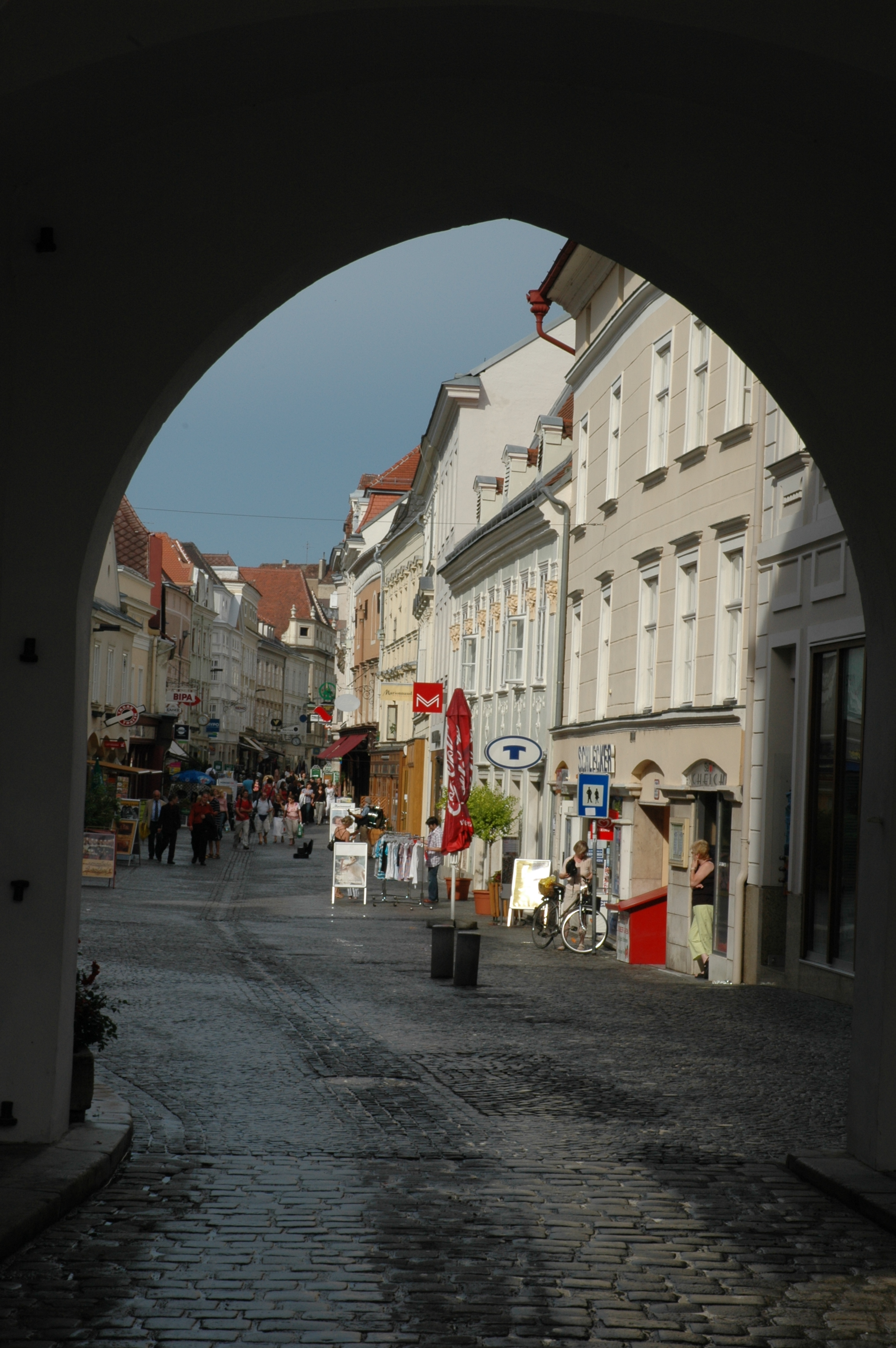 Blick durch das Steinertor in die Obere Landstraße von Krems/D.